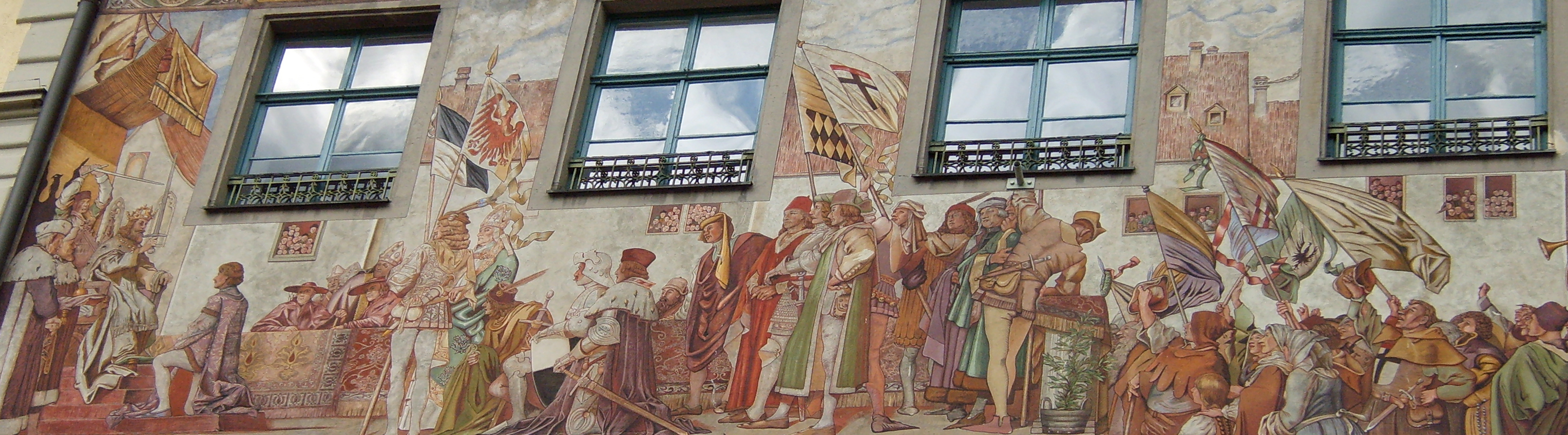 Konstanz Zum Hohen Hafen - Google Maps - Google Earth Belehnung des Burgrafen von Nürnberg mit der Mark Brandenburg